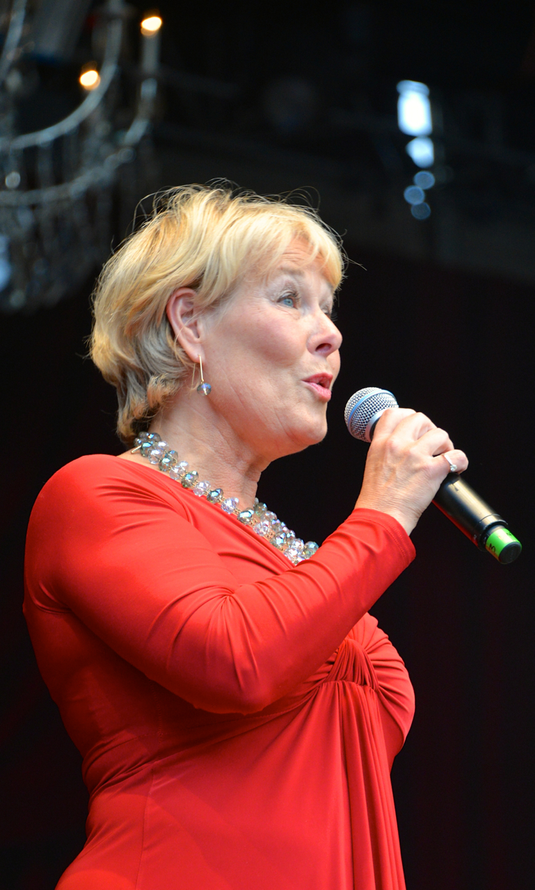 Birgitta Svendén på en konsert på Gustav Adolfs torg under Stockholms Kulturfestival den 17 augusti 2013.